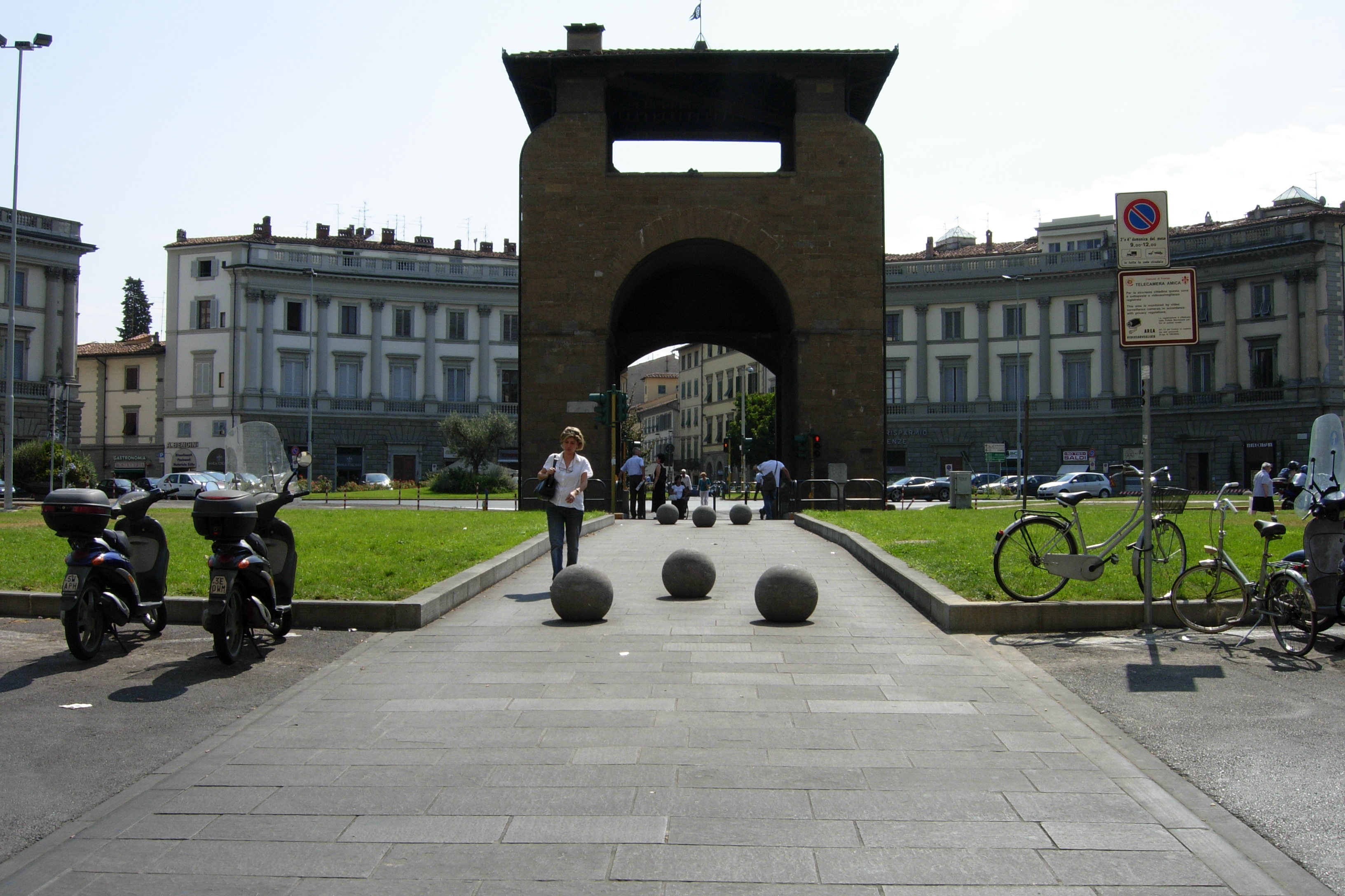 Piazza Beccaria it: La Piazza Beccaria di Firenze Source: photo uploaded by User:RicciSpeziari. Photographer: Linda Pollari